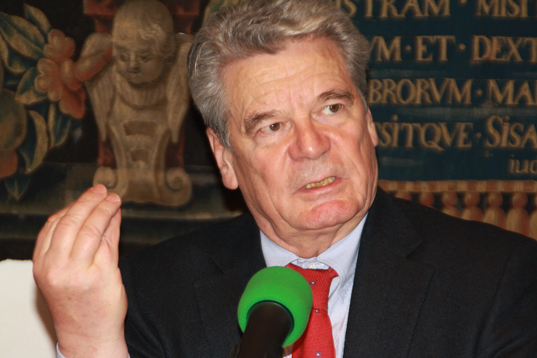 Joachim Gauck, deutscher evangelischer Pastor, kandidierte im Jahr 2010 erfolglos für das Amt des Präsidenten der Bundesrepublik Deutschland. 2012 wurde er bei Neuwahlen dann doch in das Amt gewählt. Hier am 29.11.2010 in München.